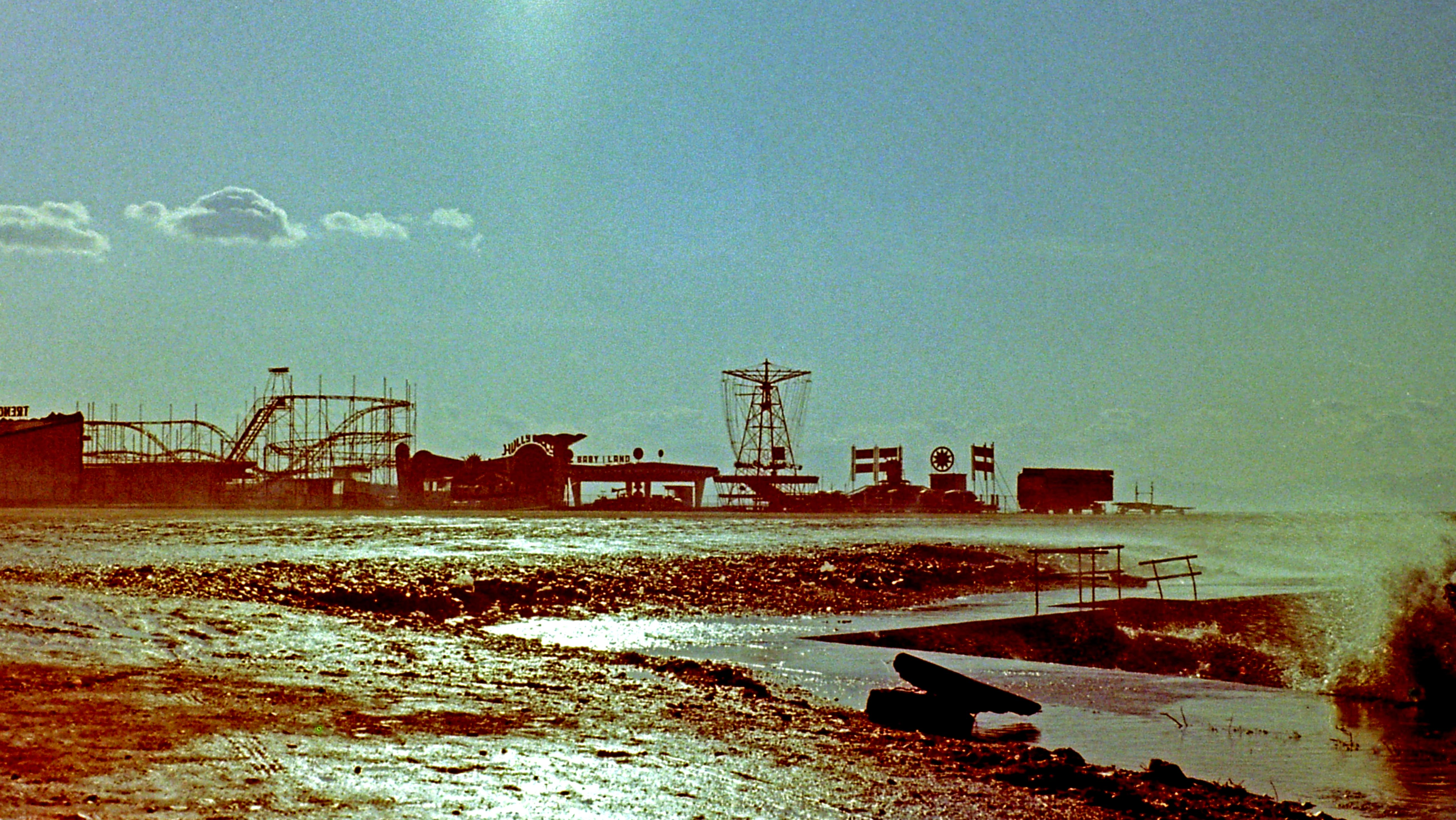 Ο χώρος του Μεγάρου Μουσικής Θεσσαλονίκης, πριν...